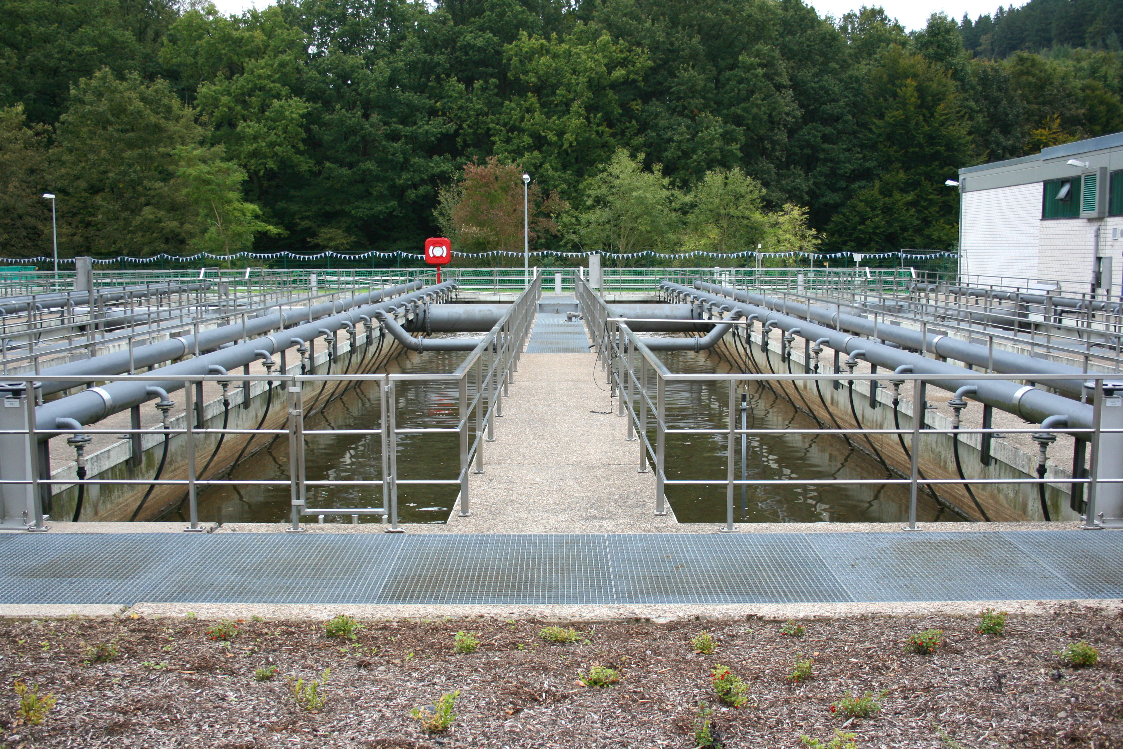 Klärwerk des Wupperverbandes in Radevormwald